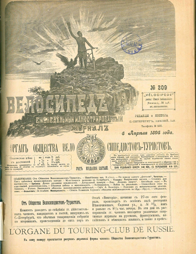 1896. Обложка журнала «Велосипед» №209